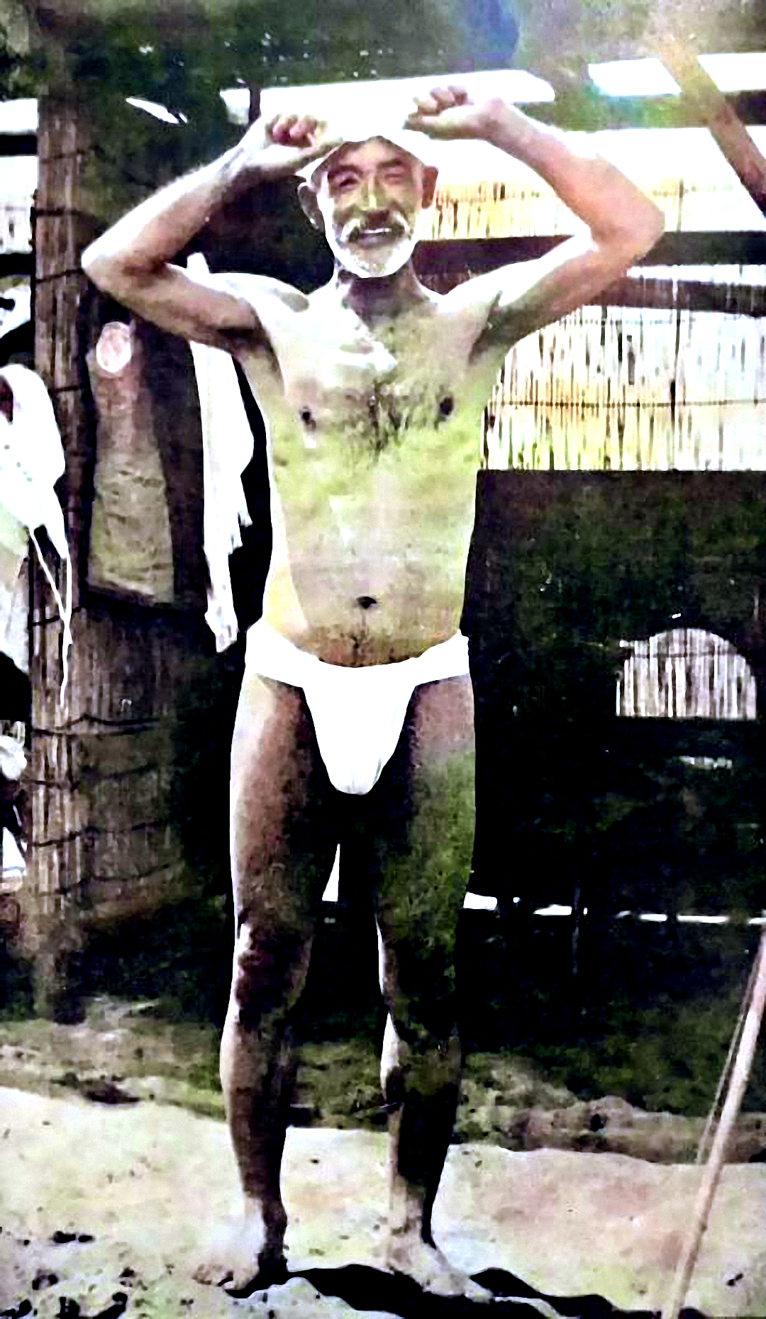 褌一丁で学習院の生徒に水泳を指導する晩年の乃木希典。